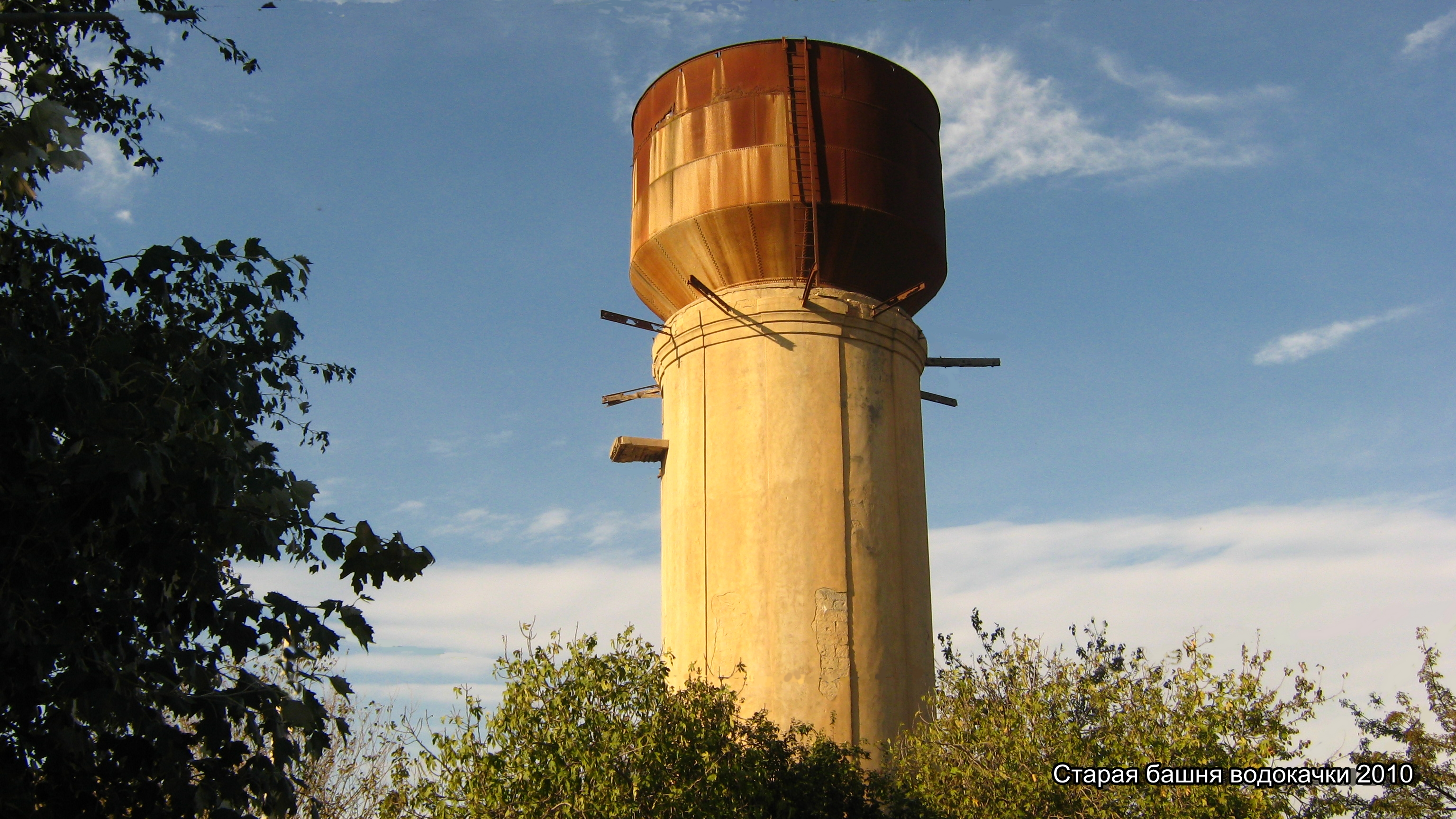 старая башня водокачки